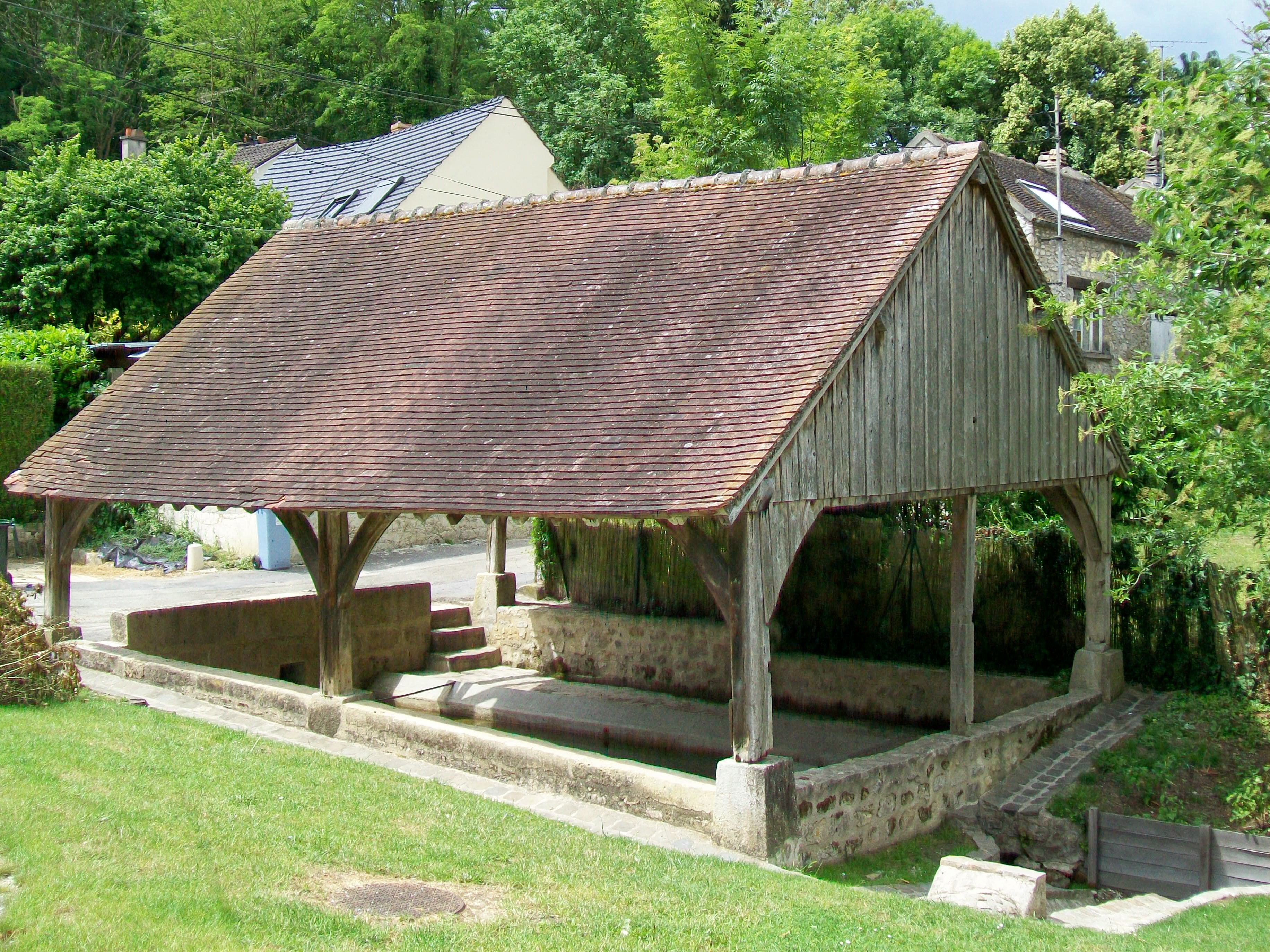 Le lavoir communal de Seugy, de 1843, au bout de la rue de la Fontaine. Jusqu'il y a peu de temps, un cloison en planches le fermait vers l'est.